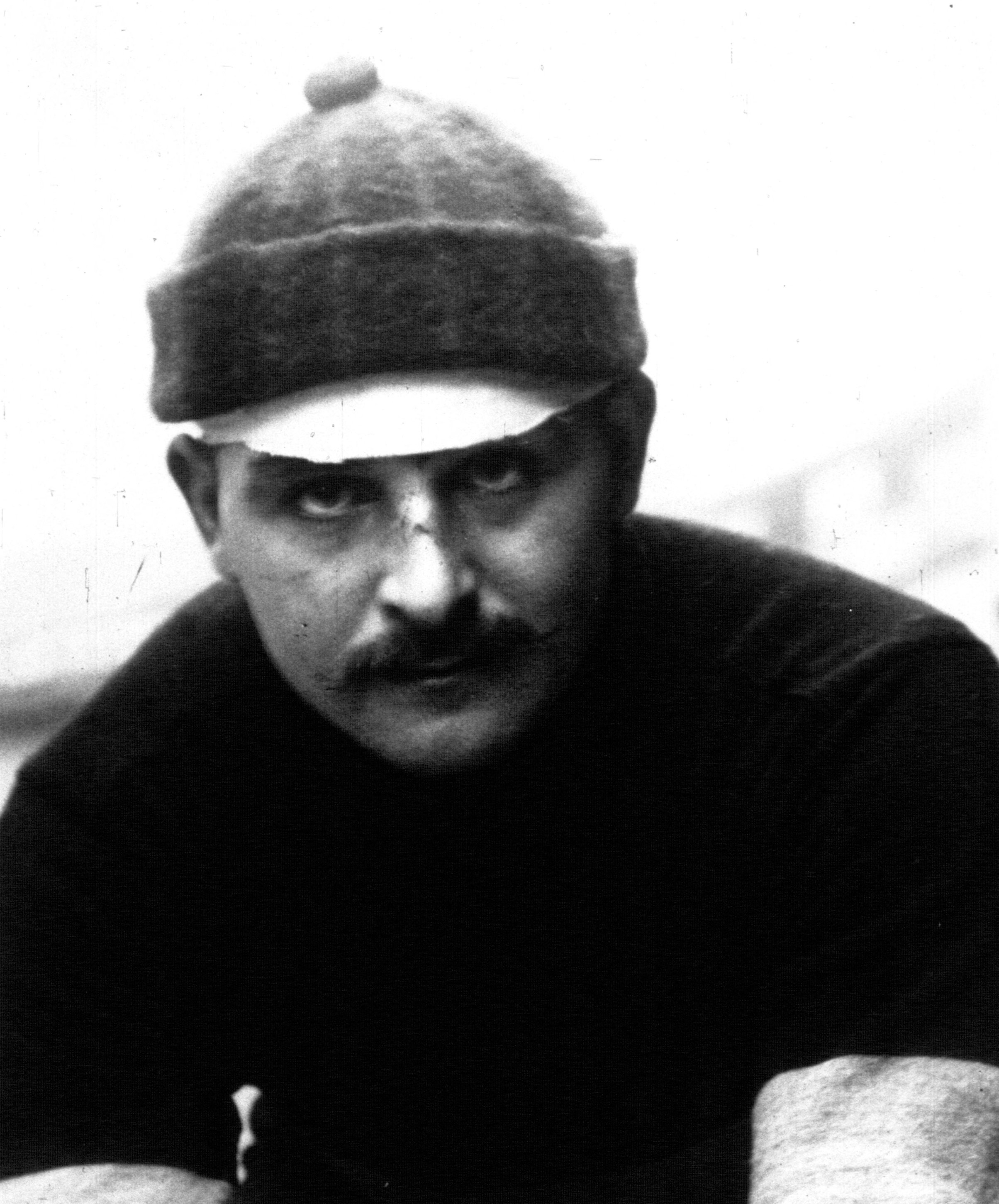 Faber, coureur cycliste.